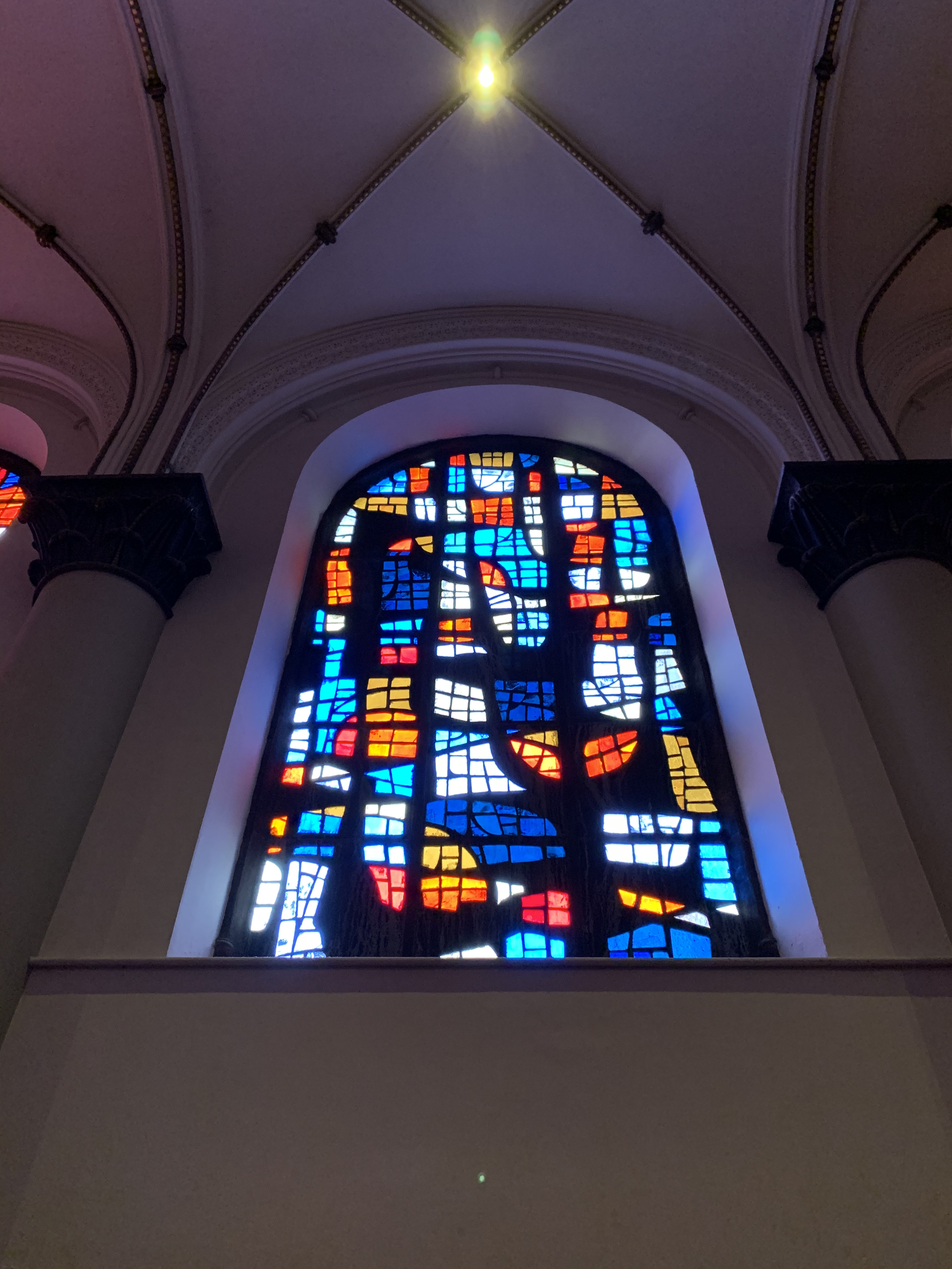 photo du vitrail présent sur les nefs latérales